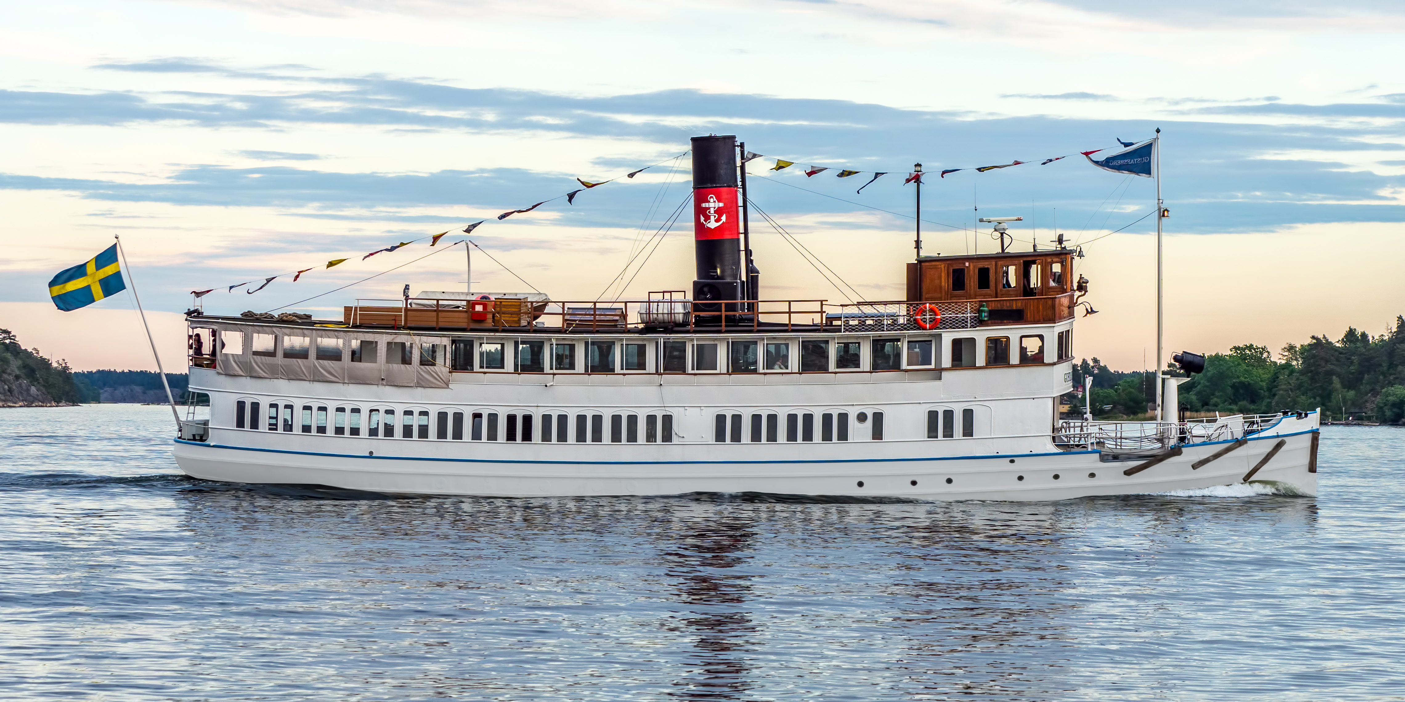 Gustafsberg VII